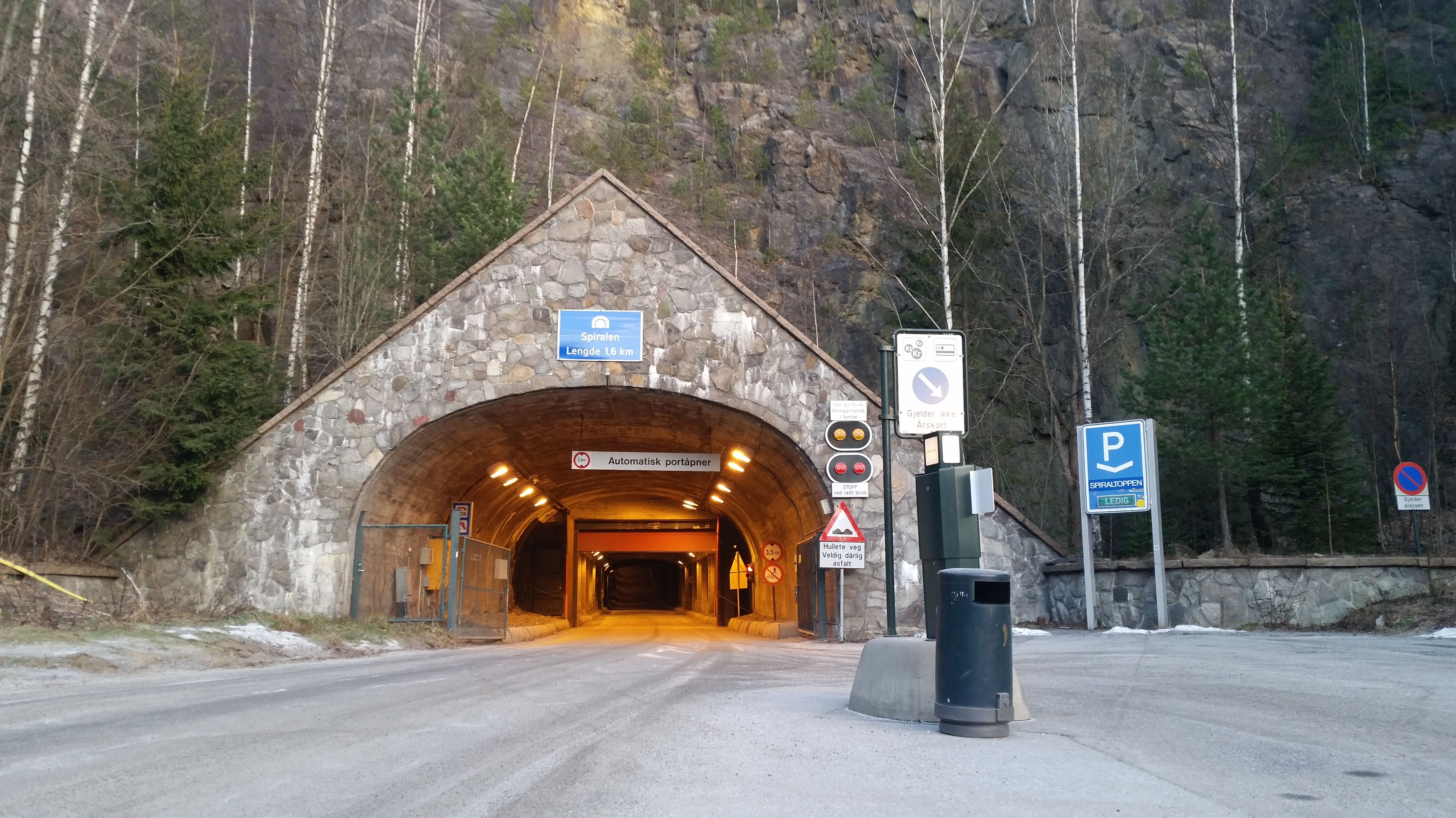 Spiralen tunnel i Drammen